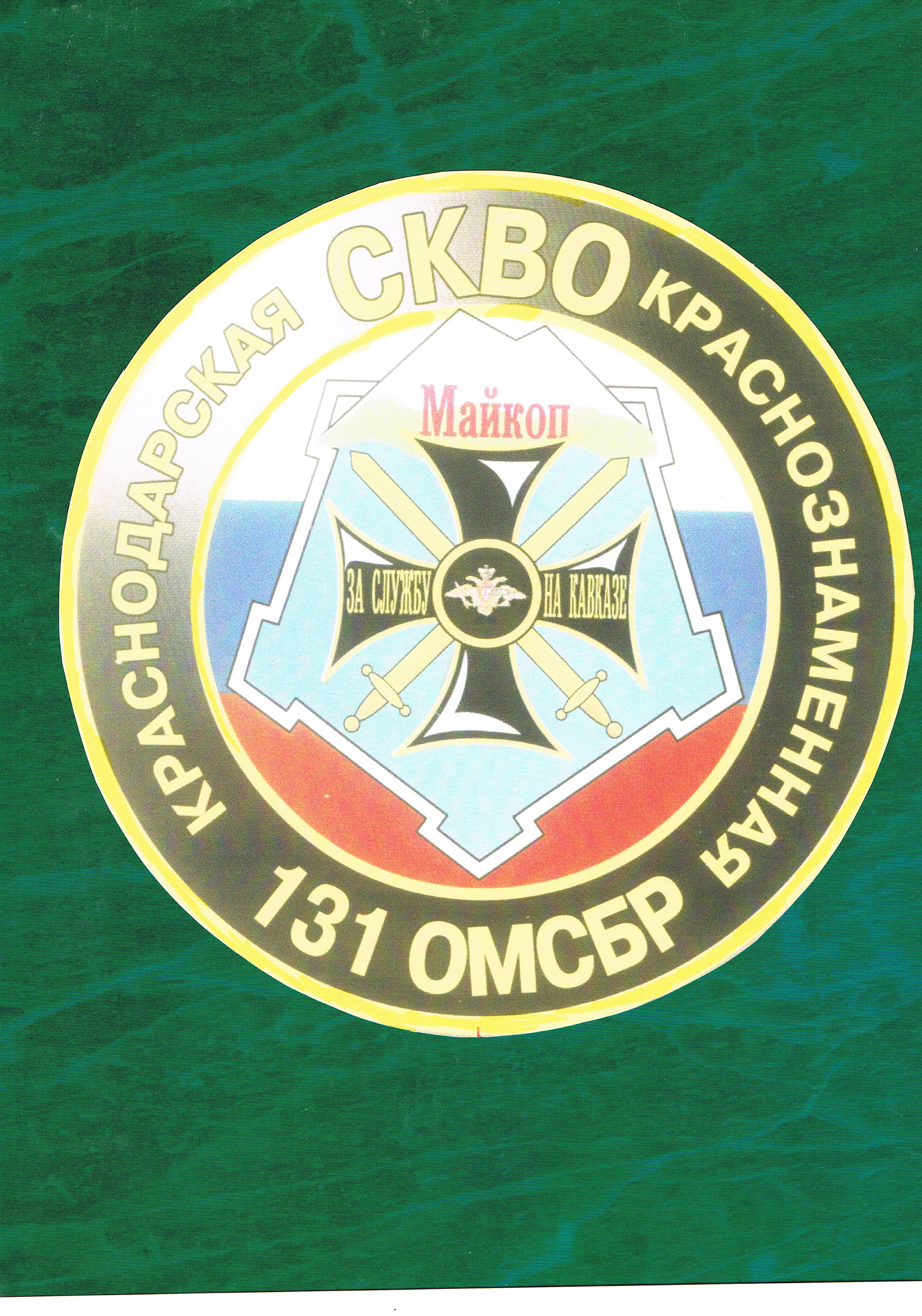 131-я отдельная мотострелковая бригада. Эмблема